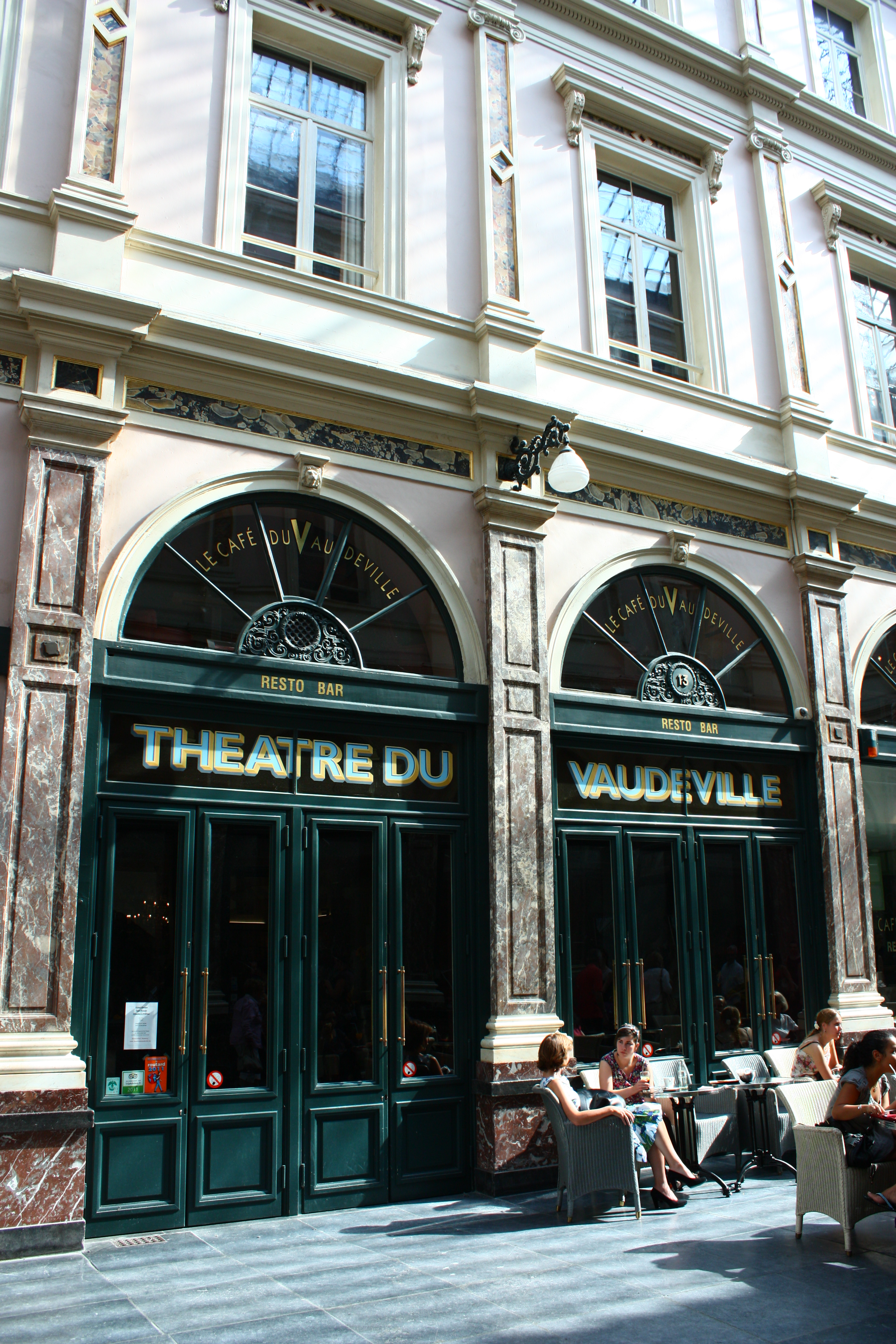 Façade du théâtre du Vaudeville situé dans la galerie de la Reine à Bruxelles. Monument classé n°2043-0338/0